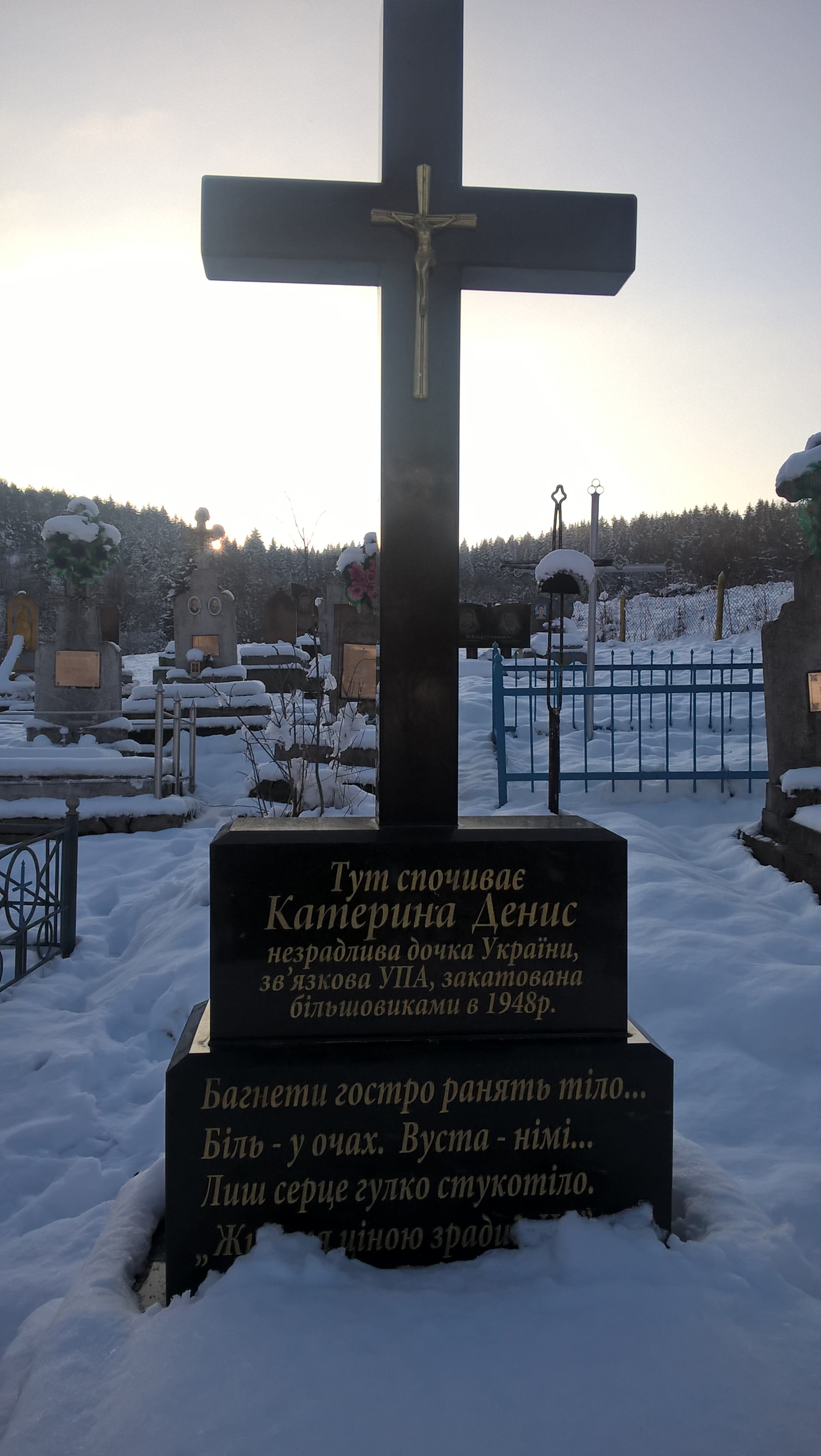 Борцям за волю України